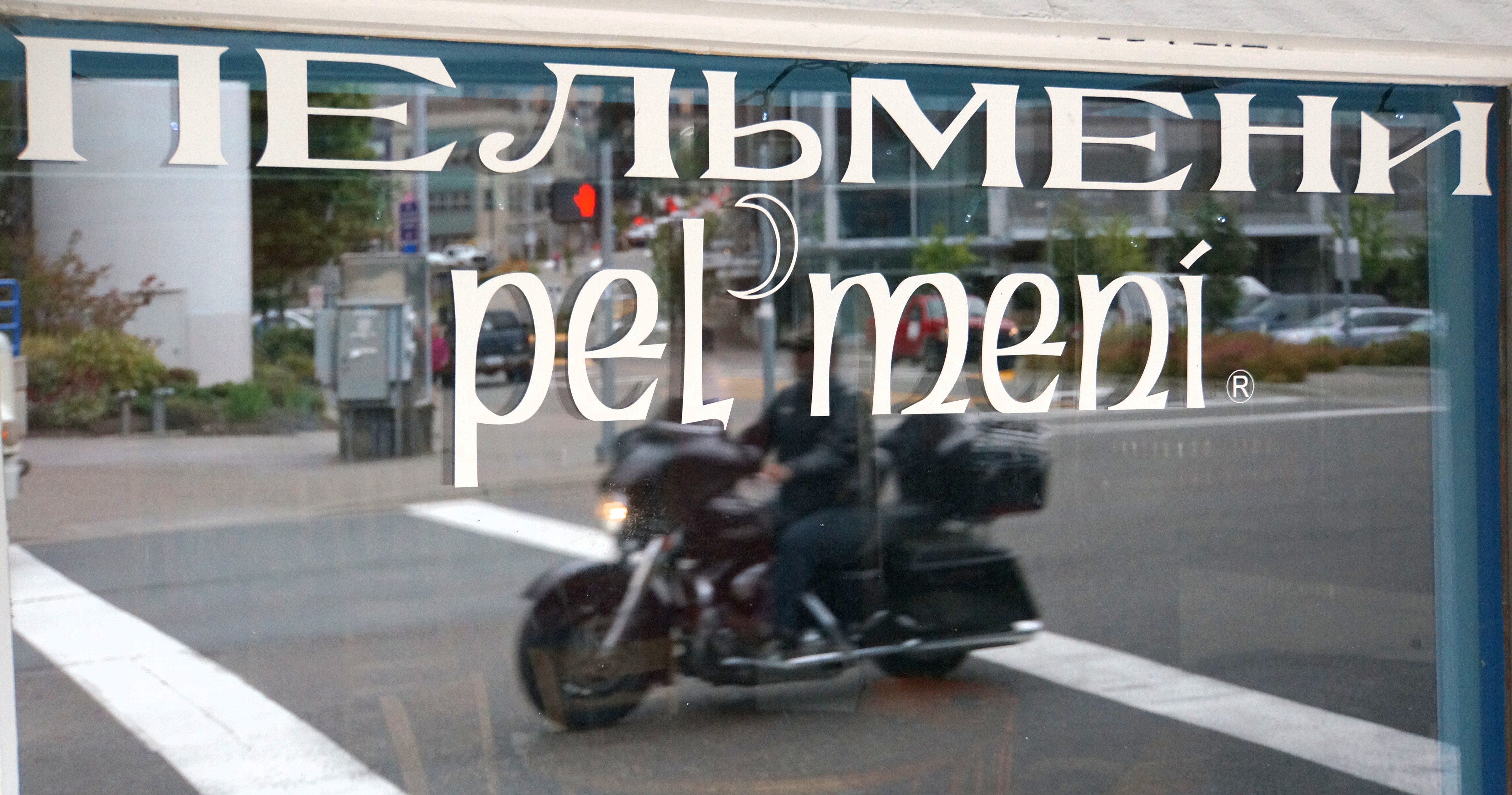 Русский ресторан в городе Джуно